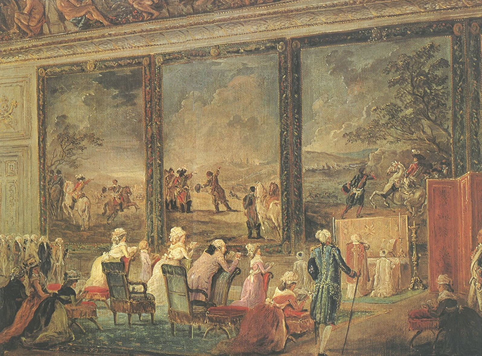 La dernière messe de Louis XVI dans la galerie des Tuileries